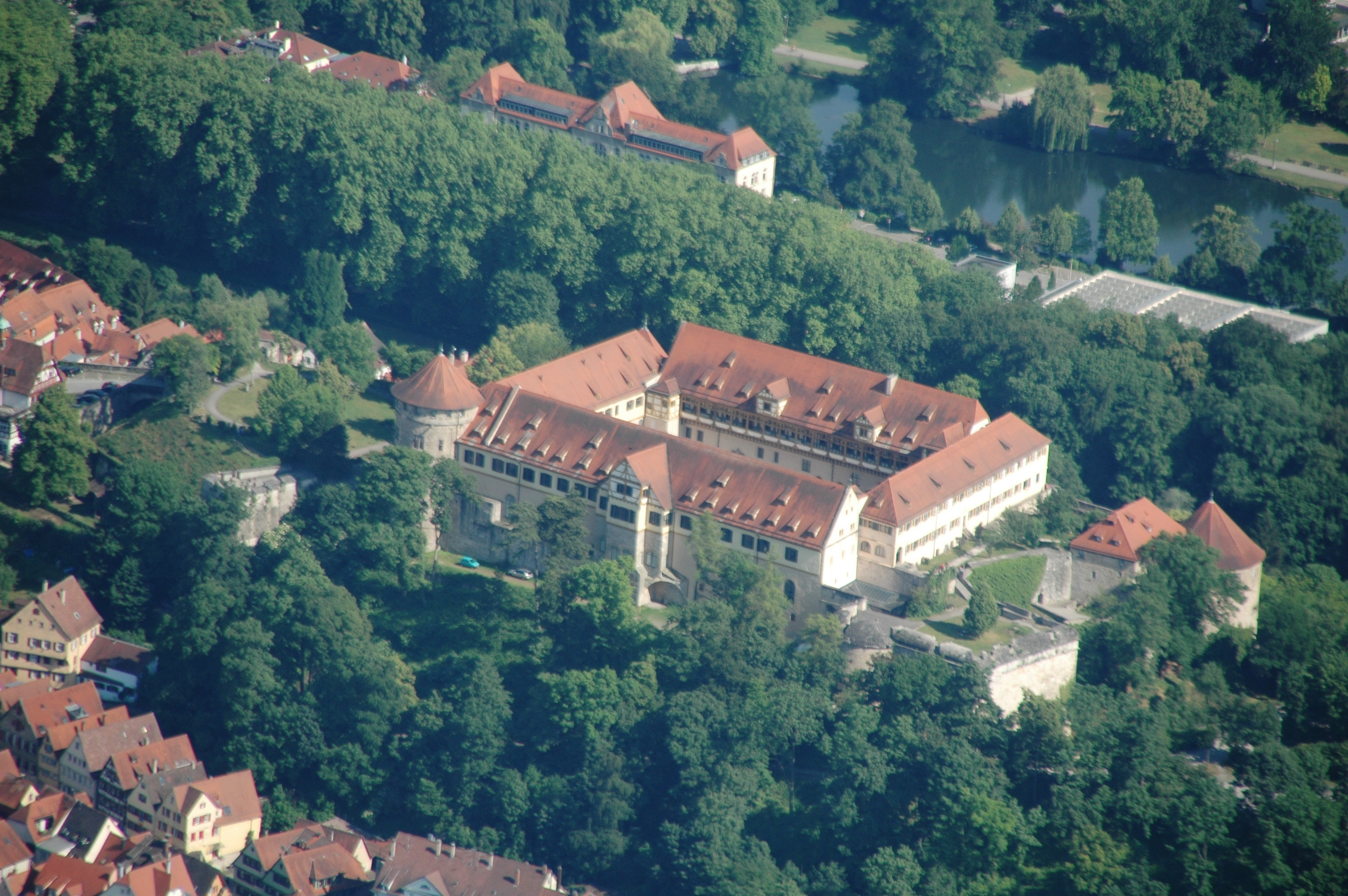 Schloss Hohentübingen (castrum twingia, 1078, Renaissanceschloß 1534-1550)